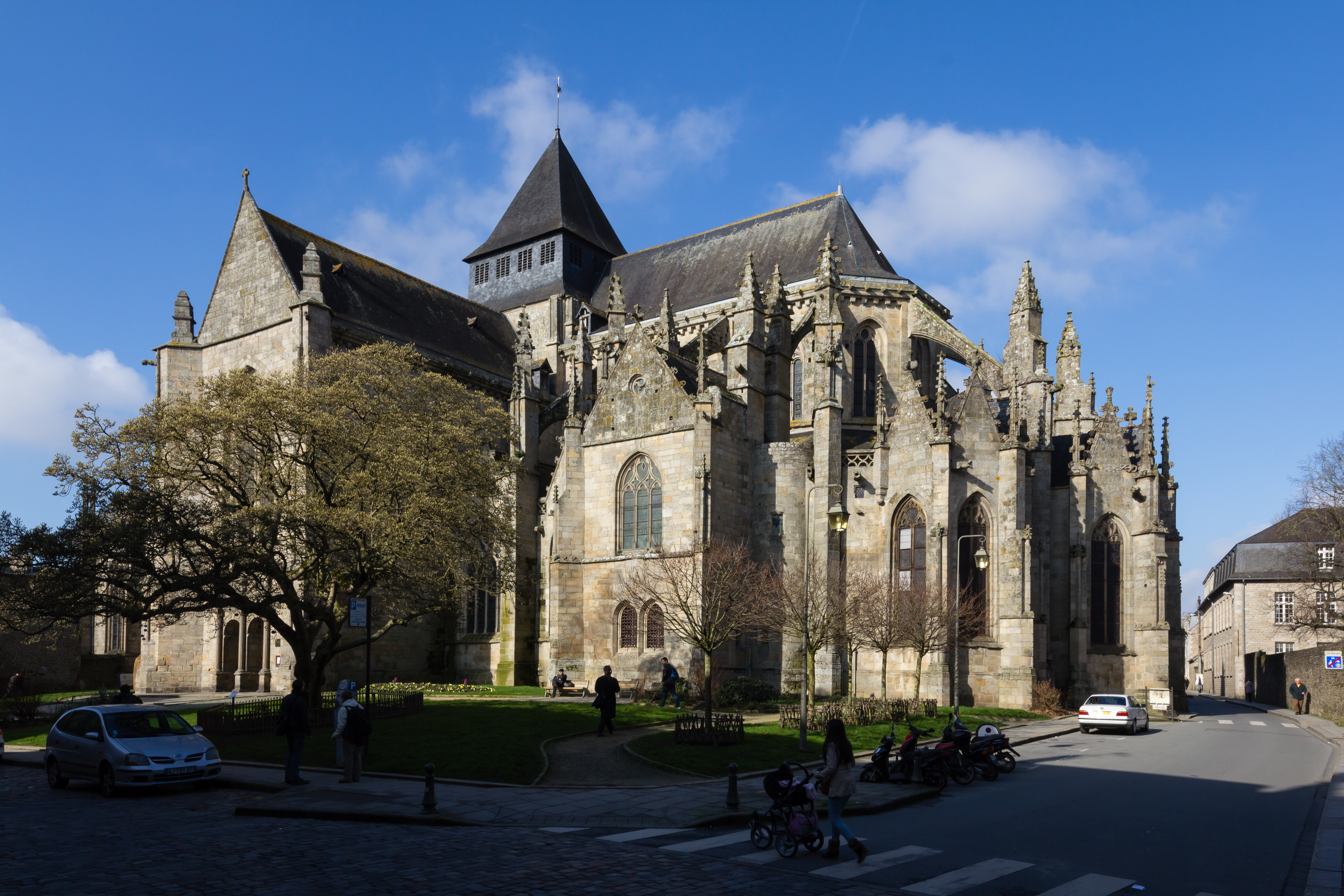 Angle sud-est de l'église Saint-Malo de Dinan (France)